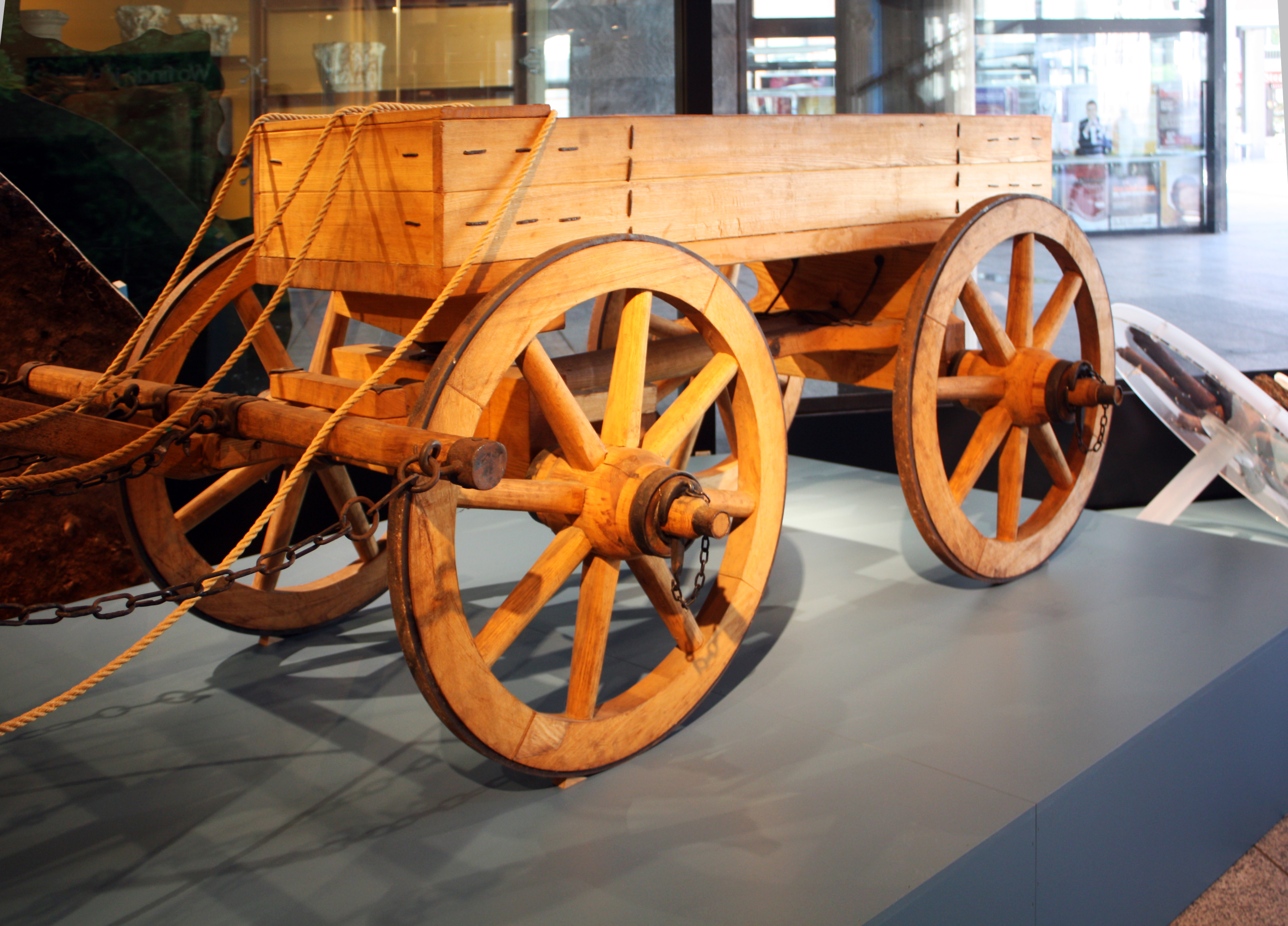 RGM-Köln. Rekonstruktion eines römischen Transportwagens. Ort der Ausstellung: Römisch Germanisches Museum in Köln.